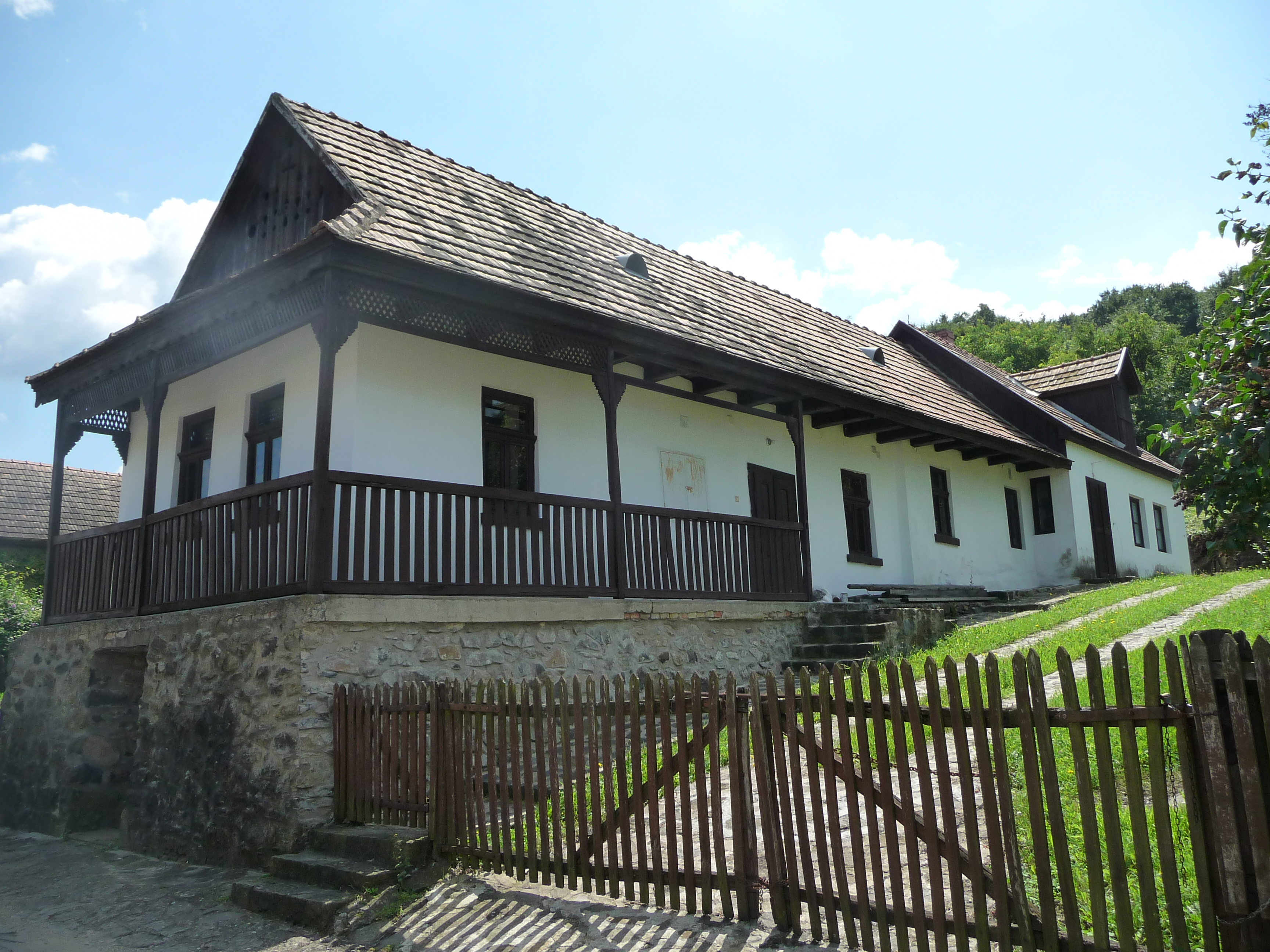 Hollókő, Kossuth u. 98–100.